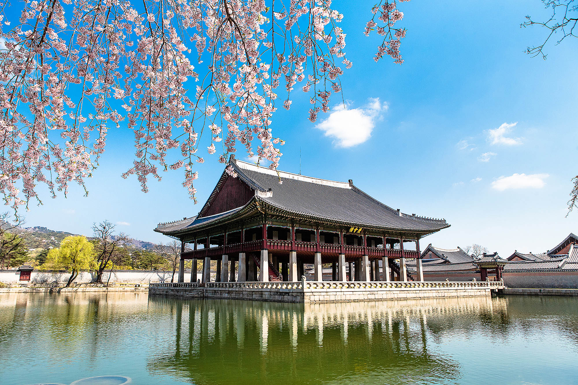 봄이 온 아름다운 경회루